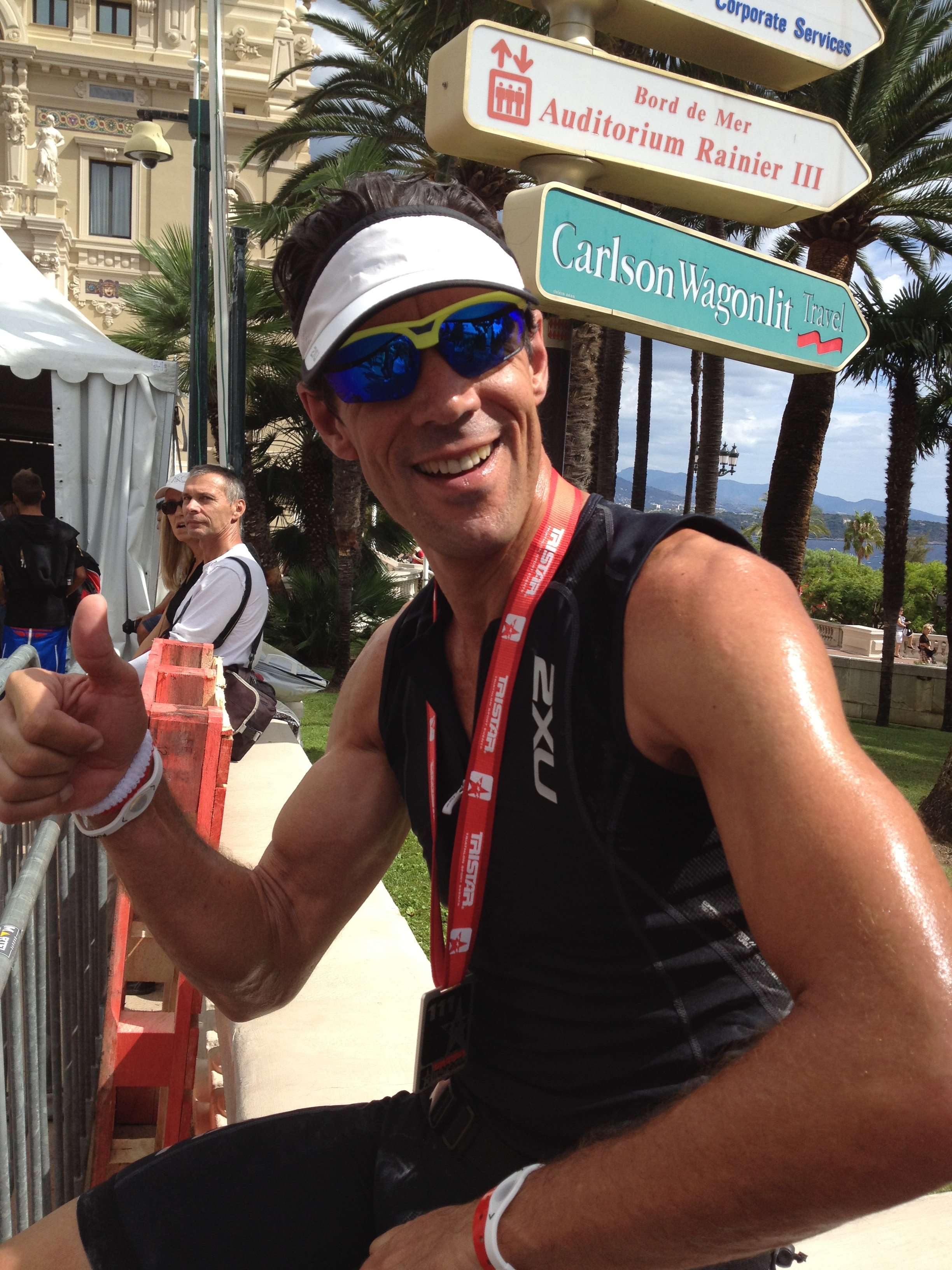 Monaco im Ziel TriStar